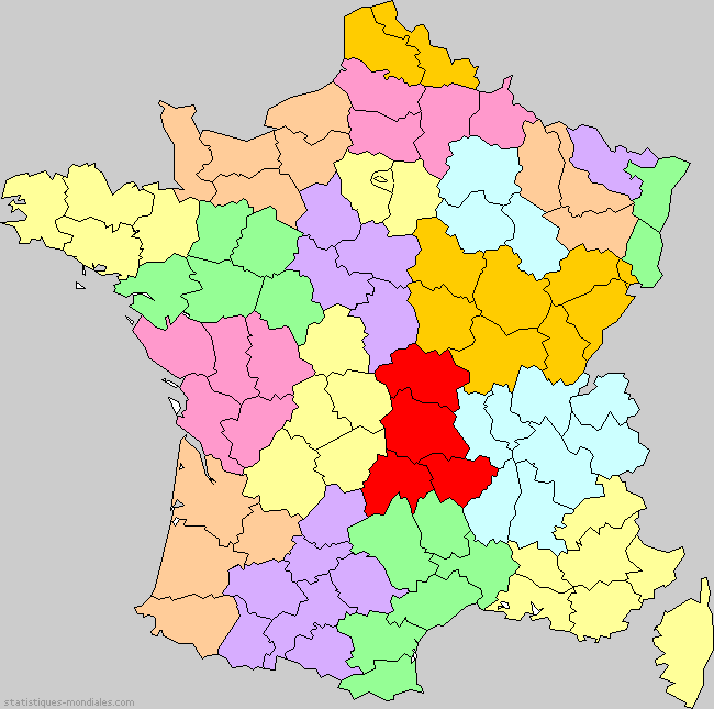 France - Préfectures régionales Etat français 1941. Source : J.M. Miossec, Géohistoire de la régionalisation en France : L’horizon régional, Quadrige/PUF, 2008